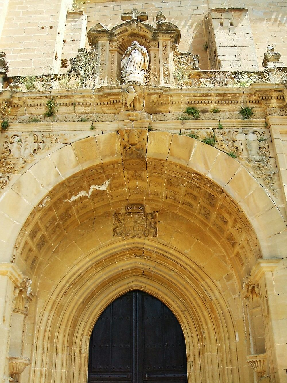 Portada de la Iglesia parroquial de Santa María la Mayor, San Vicente de la Sonsierra, La Rioja, España/Spain